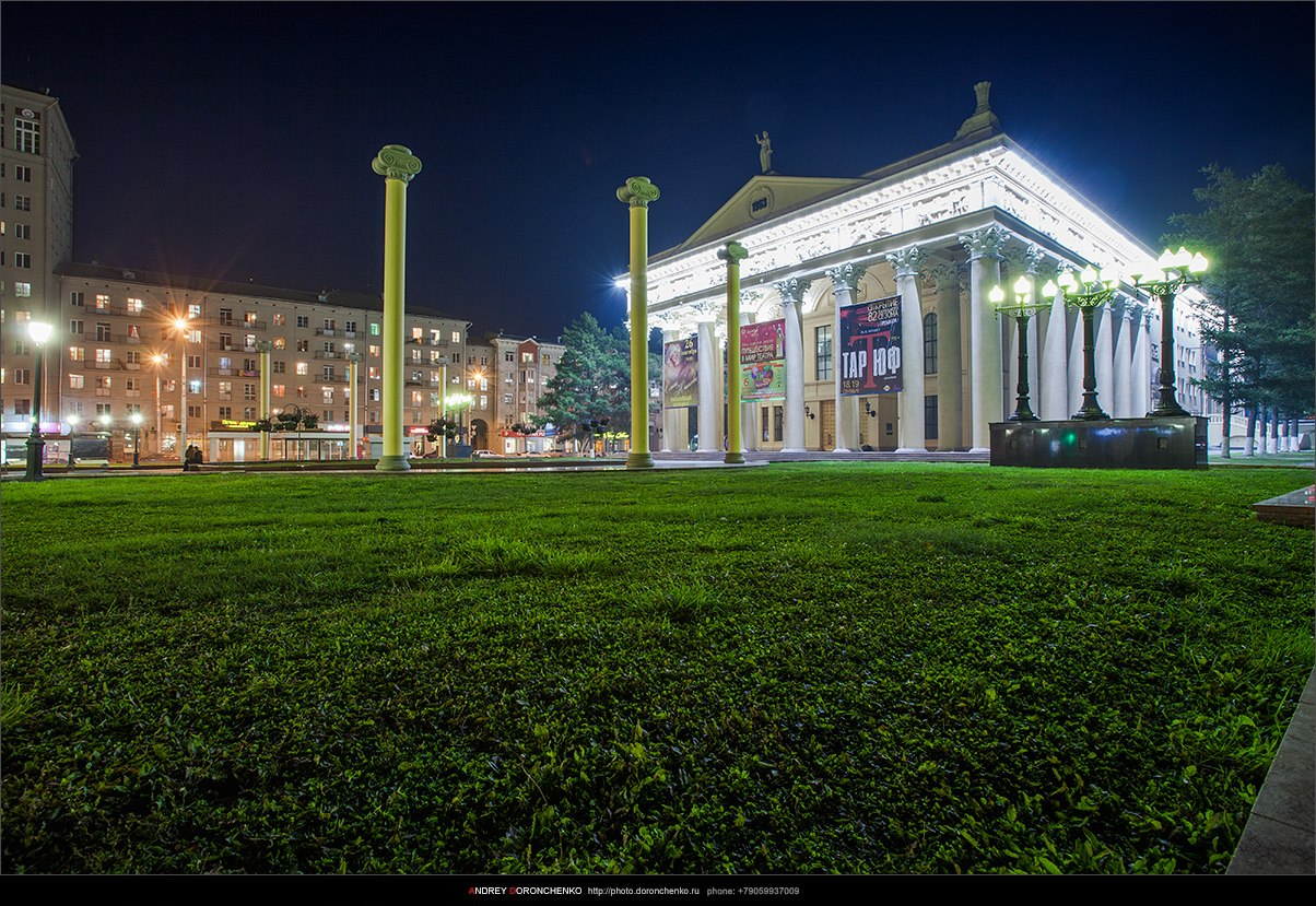 Драматический театр (Кемеровская область, Новокузнецк, Металлургов проспект, 28)